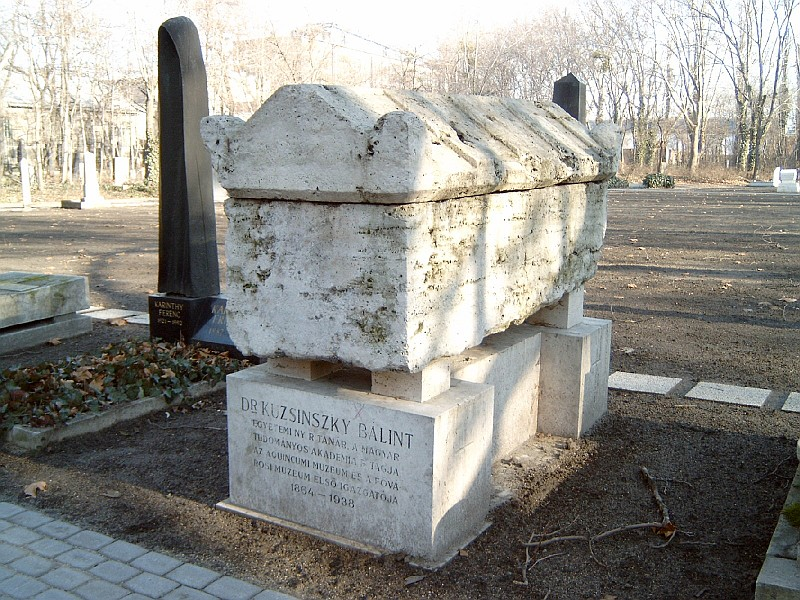 Kuzsinszky Bálint (Szabadka, 1864. nov. 6. – Bp., 1938. aug. z3.): régész, egyetemi tanár sírja Budapesten. Kerepesi temető: 41-1-34.